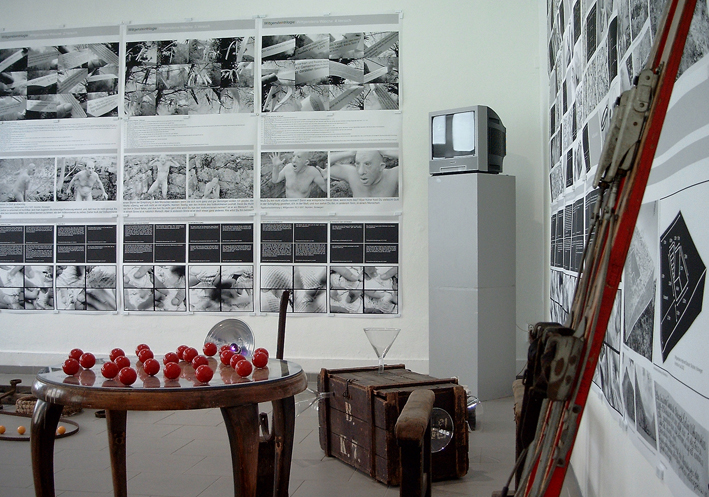 Hans-Peter Klie: Wittgensteintrilogie - 2003. Multimedia-Installation